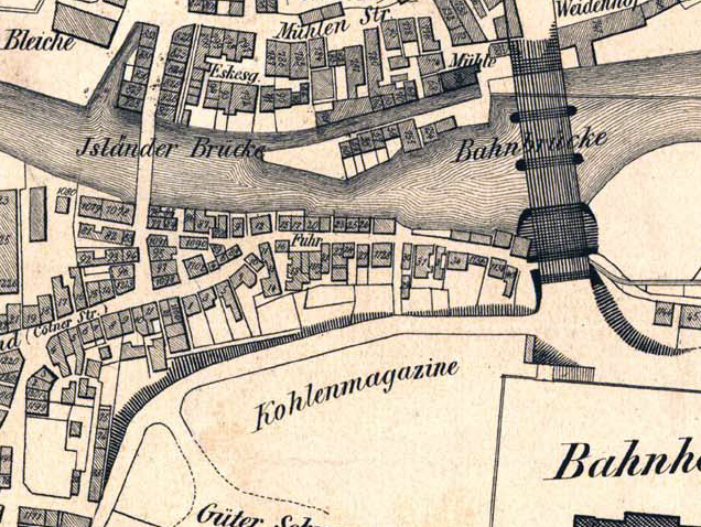 Die Fuhr. Kartenauschnitt aus dem Elberfelder Grundplan aus 1849